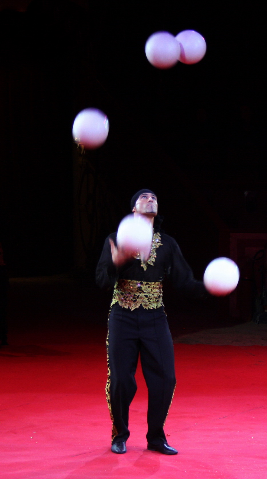 IVES NICOLS Jongleur aus Spanien mit Bällen.